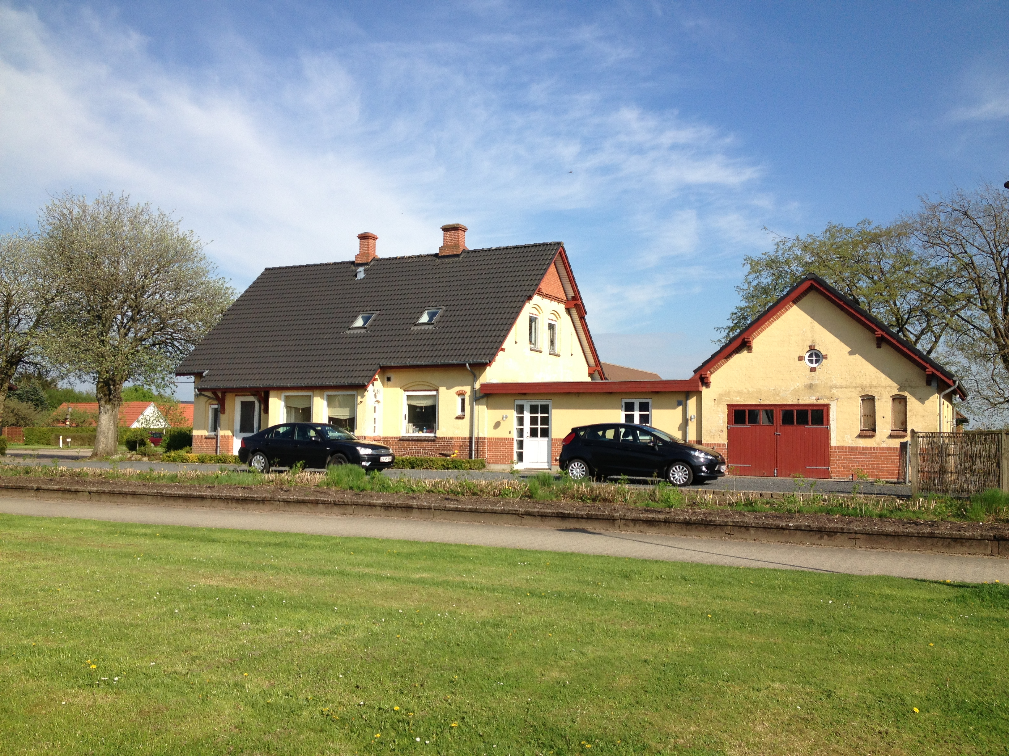 Nedlagte Frederiks Station i Frederiks, på den ligeledes nedlagte Herning-Viborg banen.